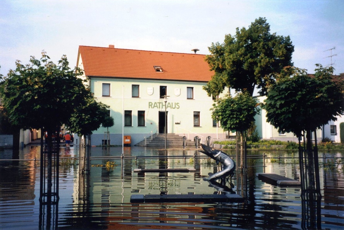 Rathaus Elster bei Hochwasser im August 2002